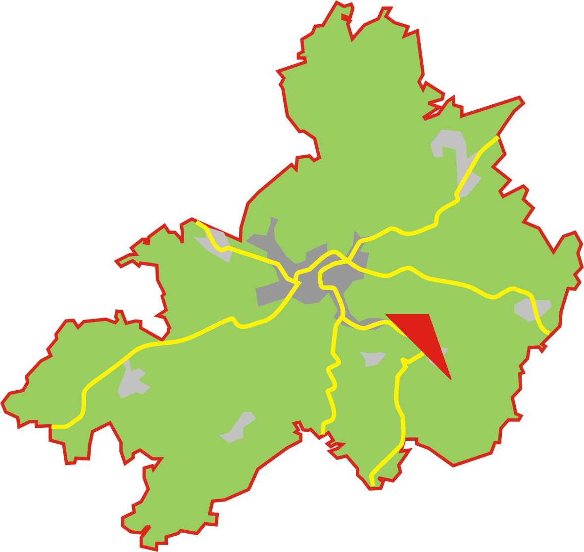 Pos dellweg